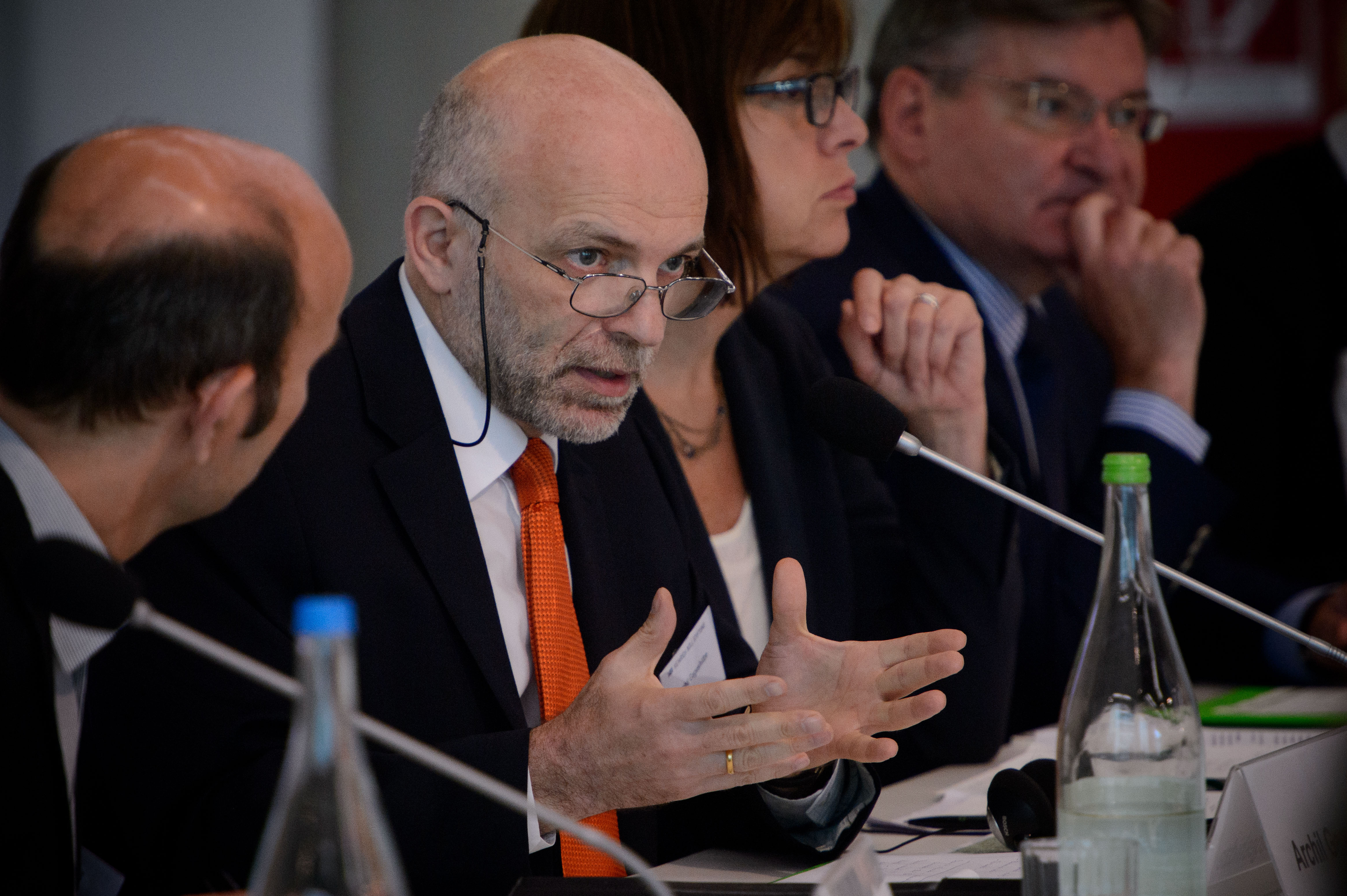 S.E. Archil Gegeshidze (Botschafter von Georgien in den Vereinigten Staaten, Washington, D.C.)